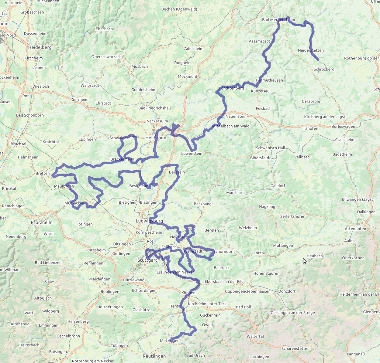 Württemberger Weinstraße. Gerendert mit UMap (Outdoors (OSM)). Streckendaten von hier: /